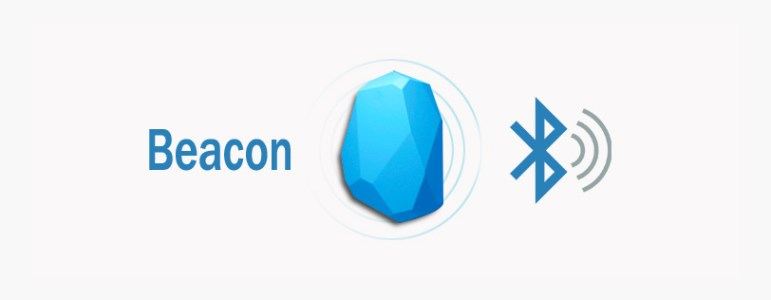 비콘의 모습